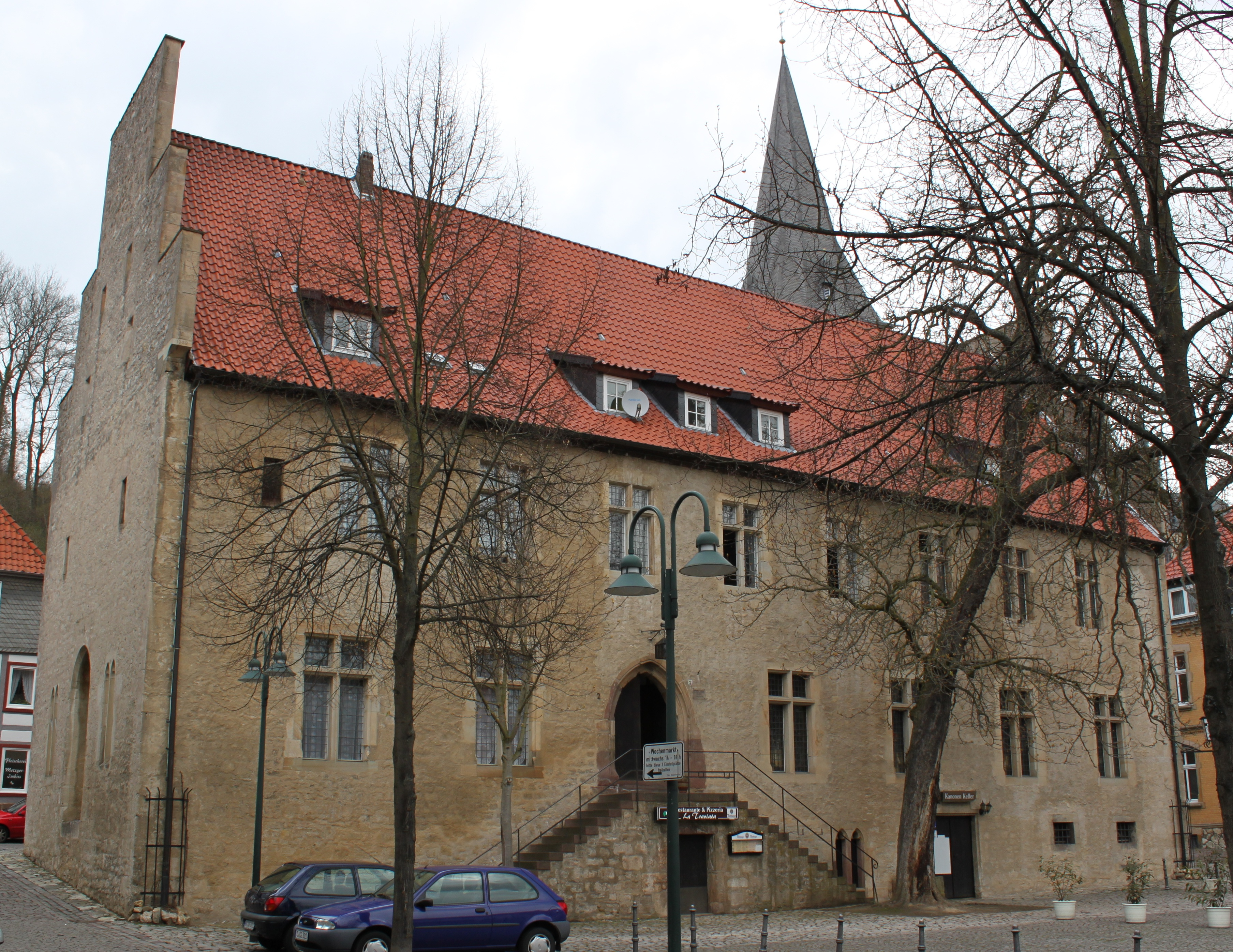 Altstädter Rathaus in Warburg (1336)